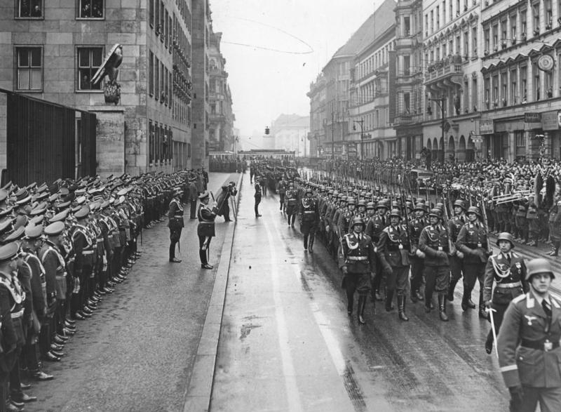 Berlin, Parade am Tag der Luftwaffe Der Tag der Luftwaffe 1939 Vorbeimarsch der Ehrenformation der Luftwaffe vor Generalfeldmarschall Göring vor dem Reichsluftfahrtministerium in der Wilhelmstr. [Berlin, Wilhelmstraße.- Parade vor dem Reichsluftfahrtministerium] Information added by Wikimedia users.